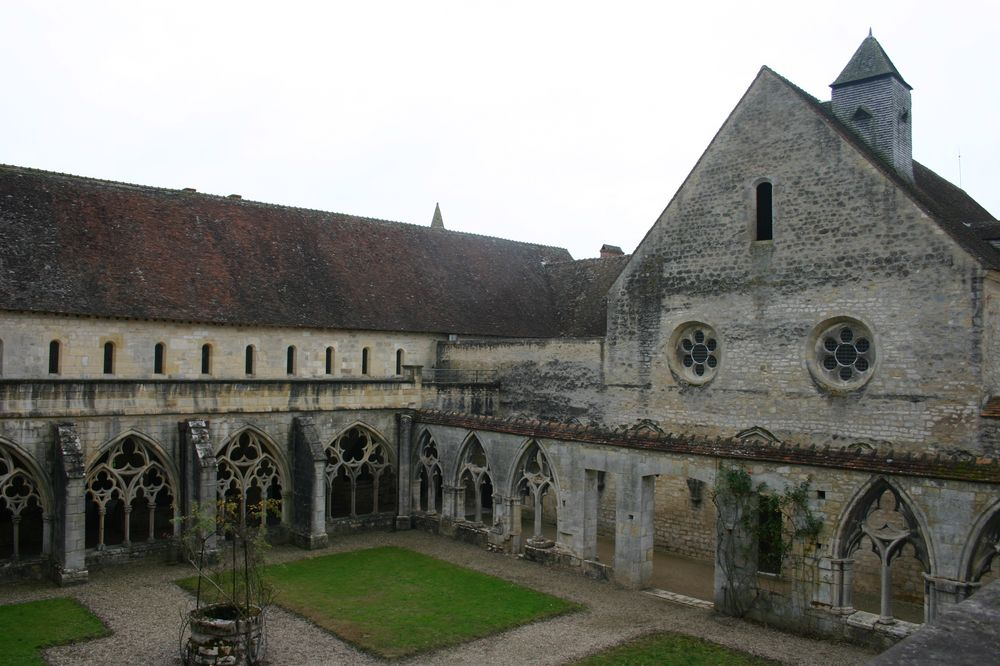 Cloître de l'Abbaye de Noirlac (Cher)